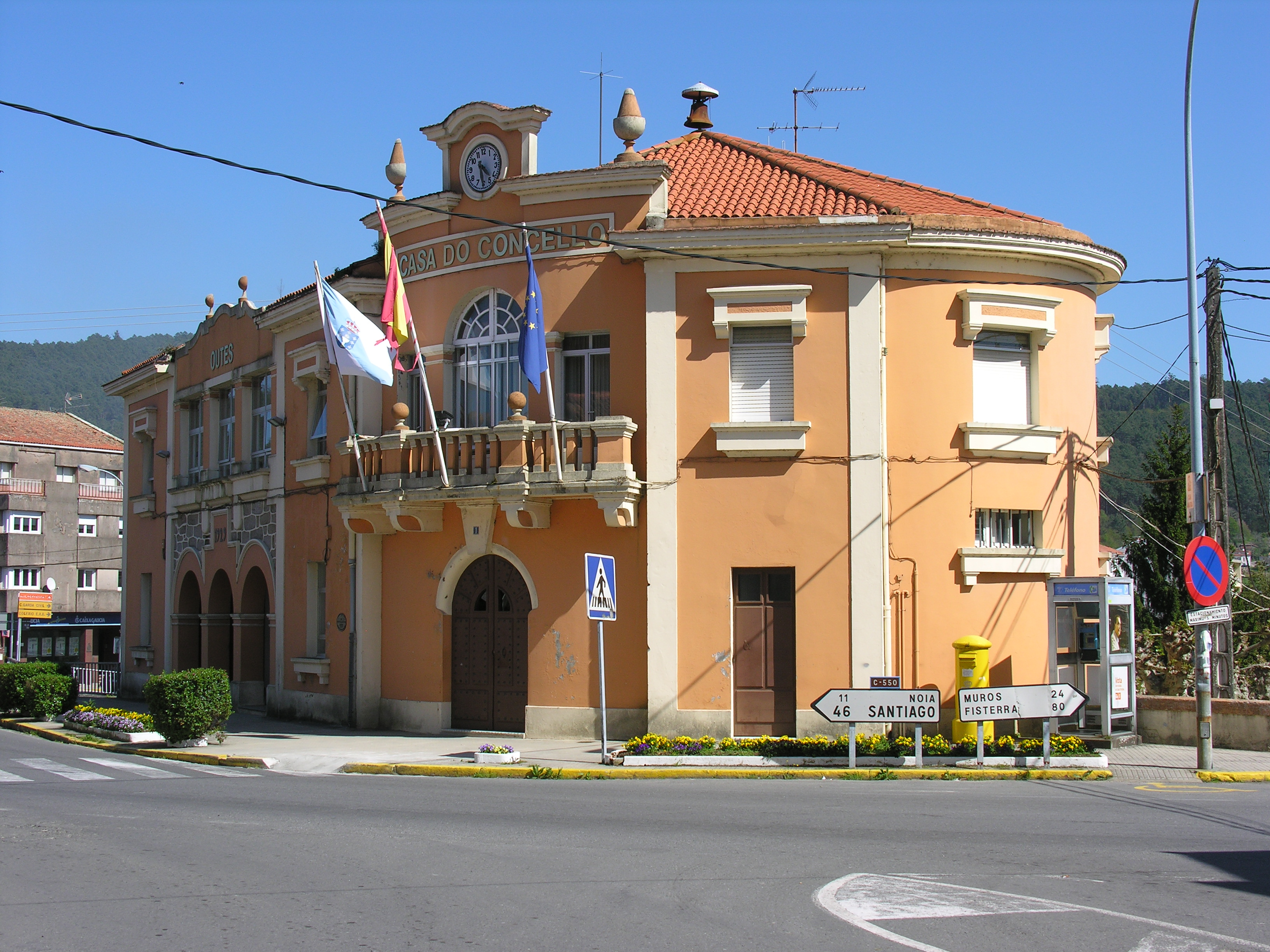 Casa do concello de Serra de Outes, (Galiza)